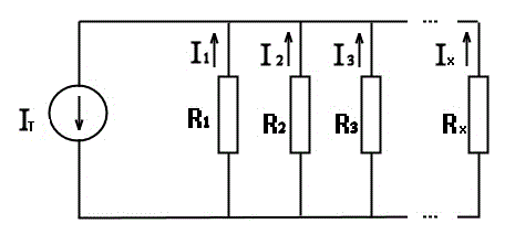 Circuito de resistencias en paralelo alimentadas por una fuente de corriente.